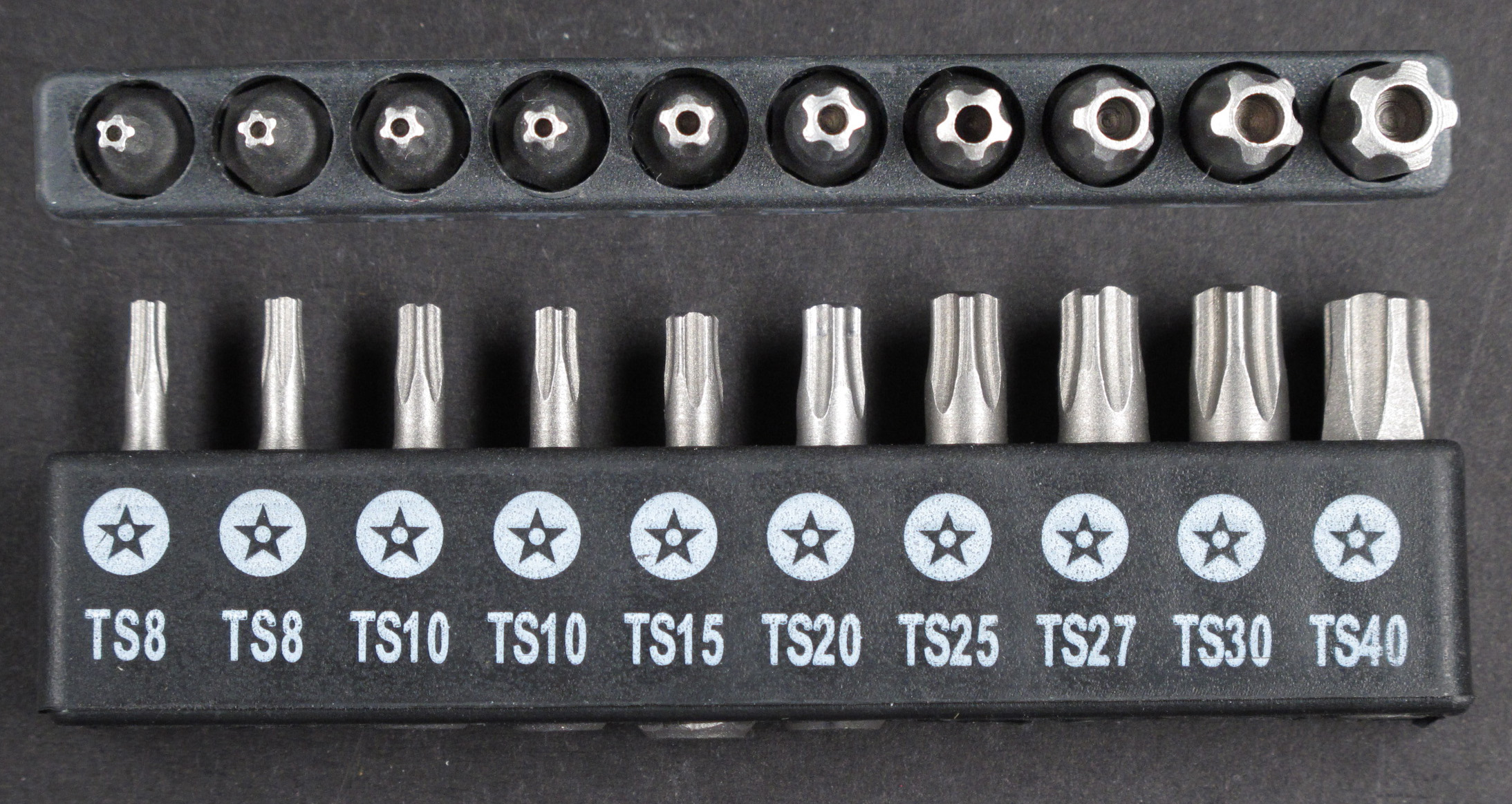 Torx Plus Security Bitsatz (Tamper-Resistant als Fünfeck)